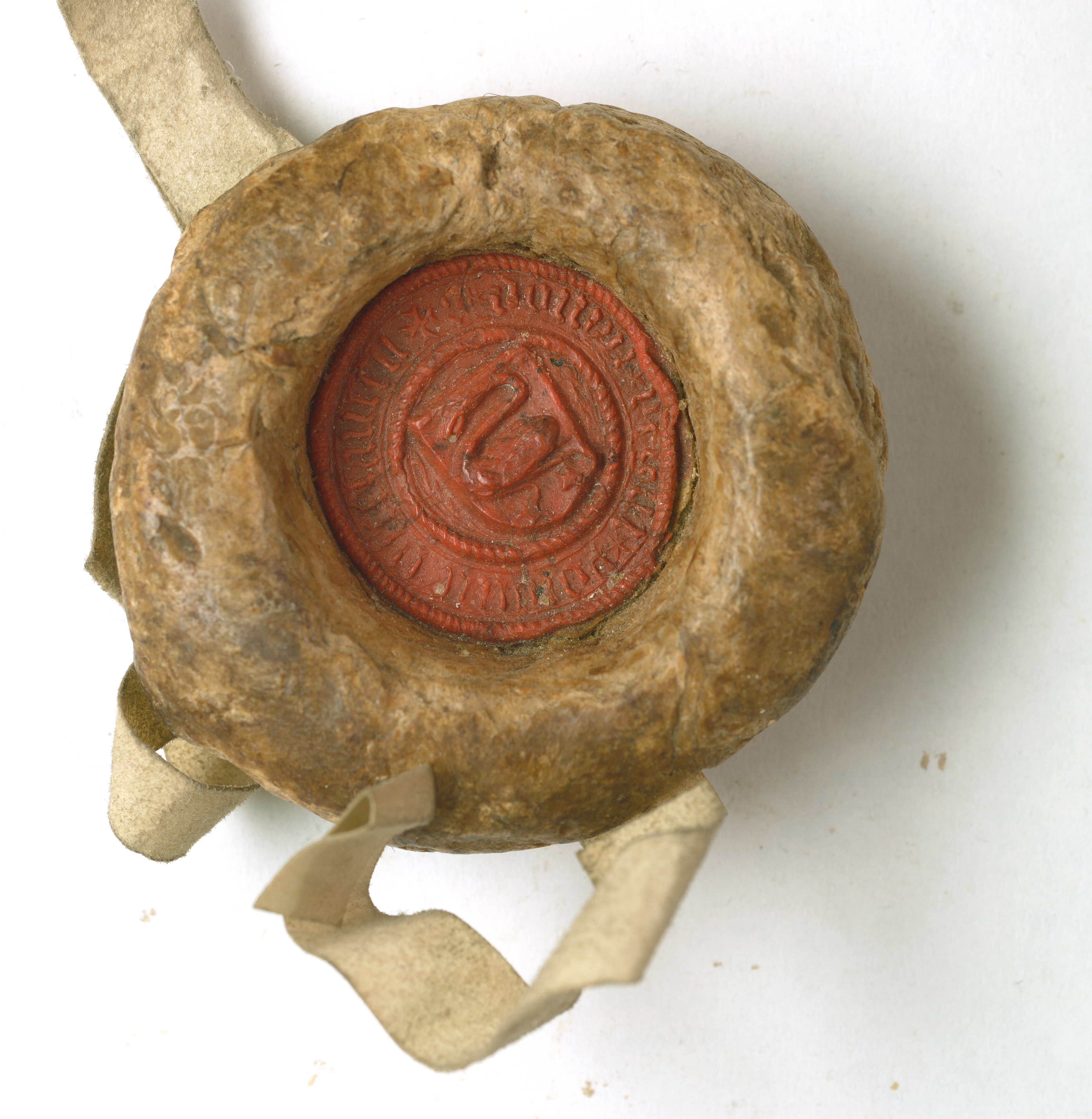 Pieczęć Dunina ze Skrzyńska, podkanclerzego z herbem Łabędź. Legenda: S * DUNINI * REGNI * POLONIAE * VICECANCELLARII. Na pasku, w czerwonym wosku; średnica: 2,7 cm.